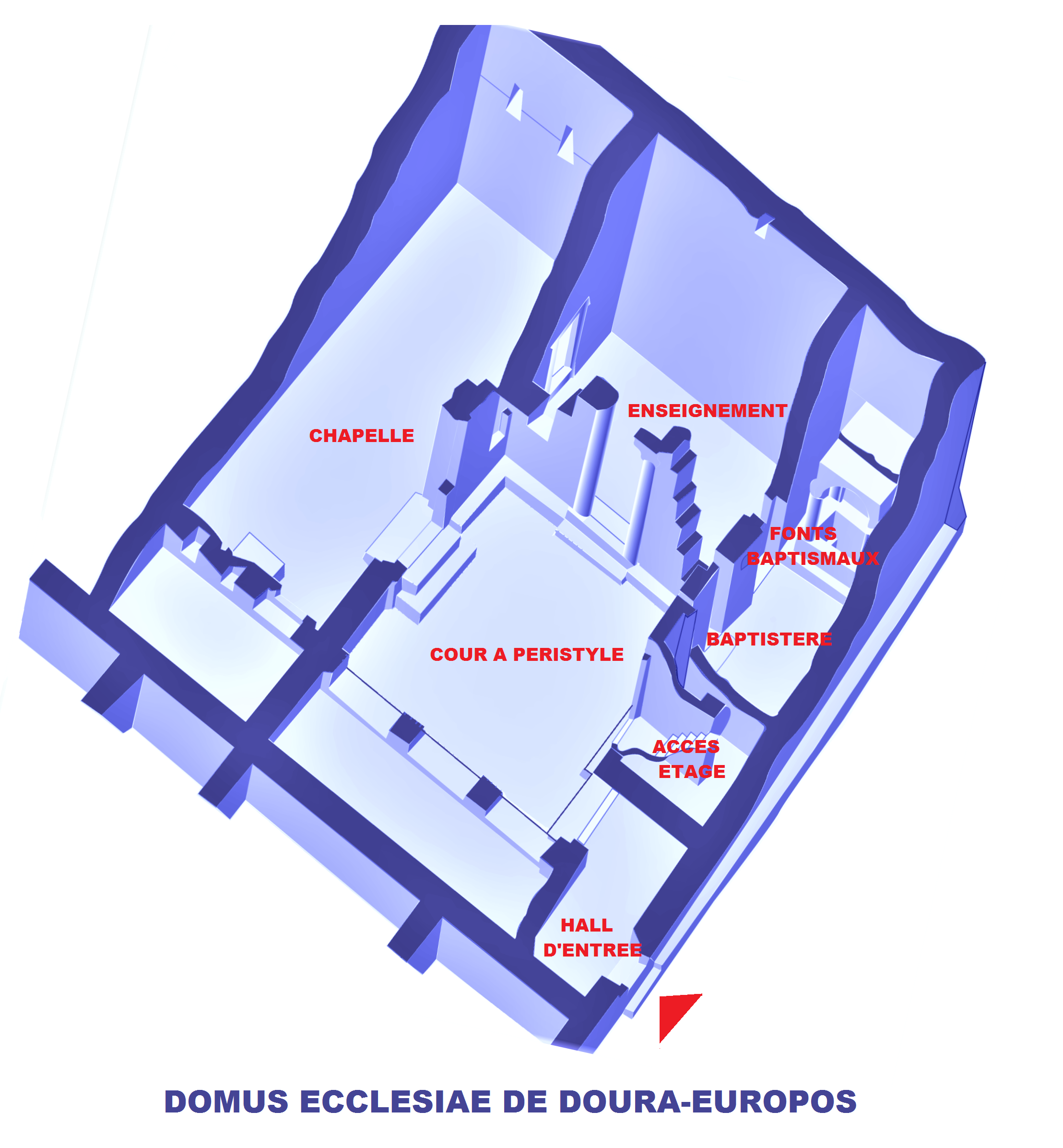 Doura-Europos, Domus ecclesiae (image commons modifiée)